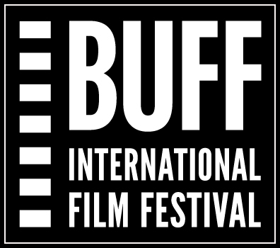 BUFFs logga.